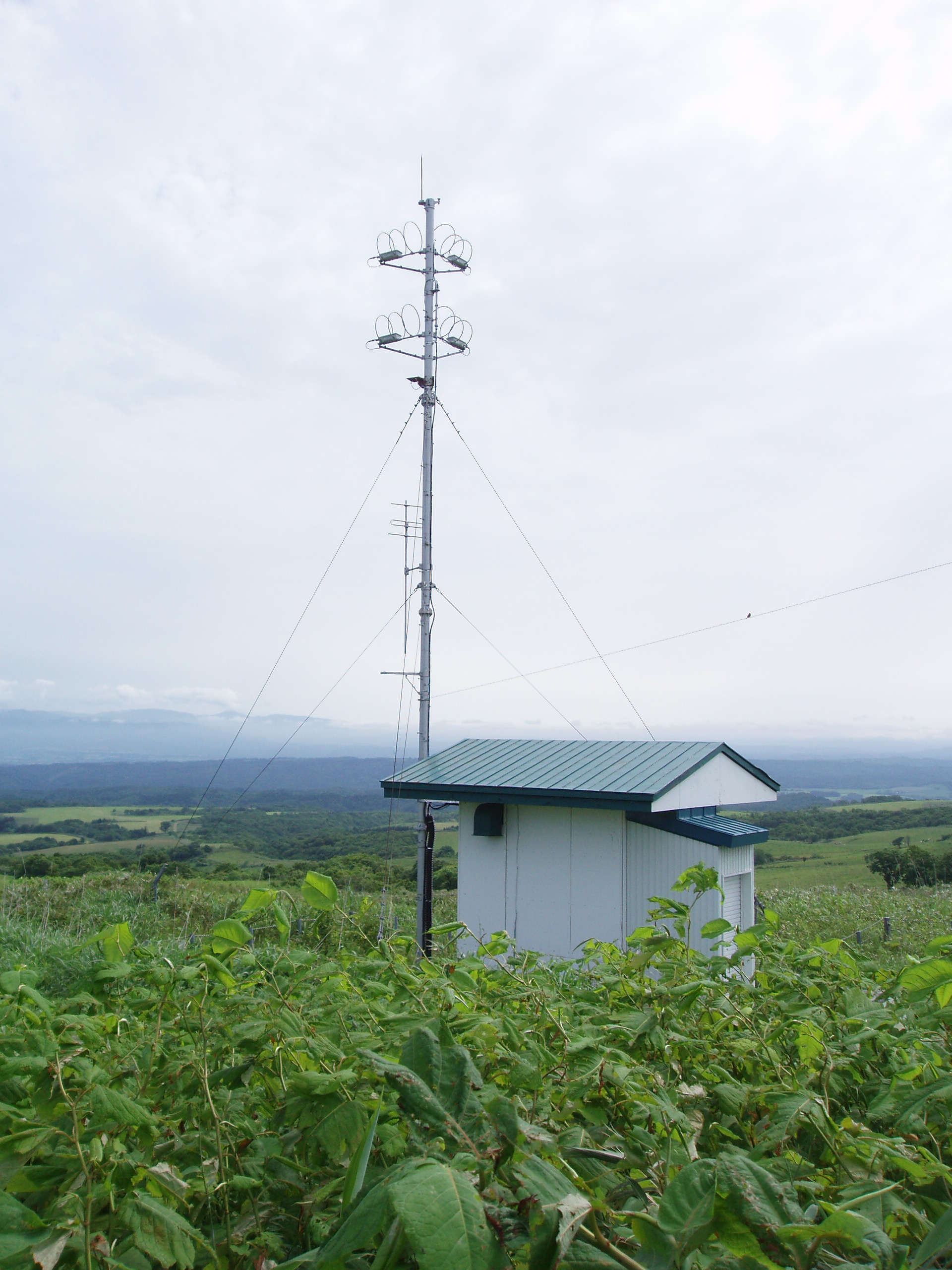 北桧山中継局 STV送信設備